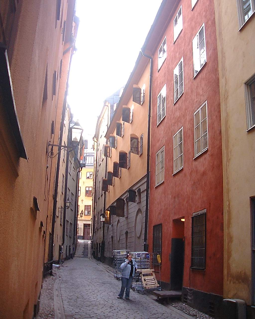 Kråkgränd, Gamla stan, Stockholm.